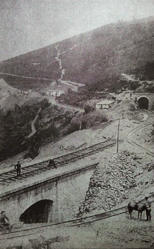 Baustelle der Eisenbahnstrecke auf der Nordseite des Pajares-Pass